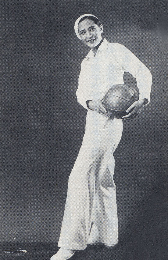 水の江瀧子（1931年、『先生様はお人好し』）